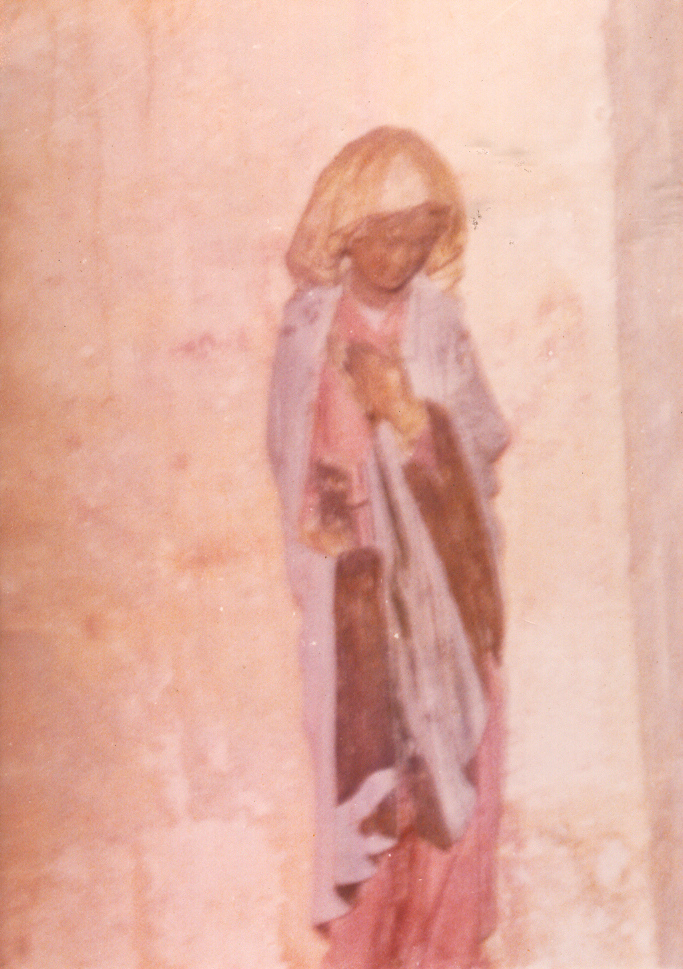 La Magdalena de la ermita de Santo Cristo de Reveche (desparecida en 1977)